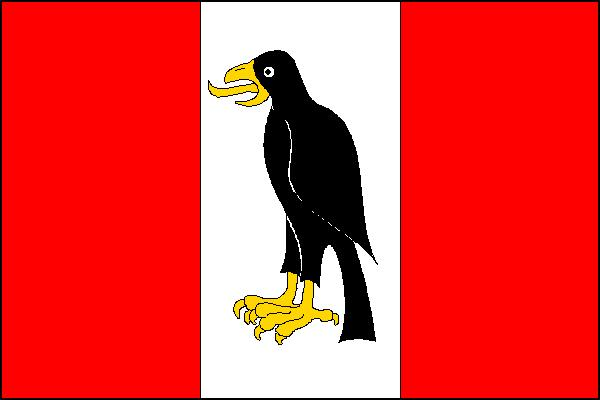 Vlajka obce Sokolnice